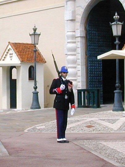 Monaco, Wache vor dem Palast